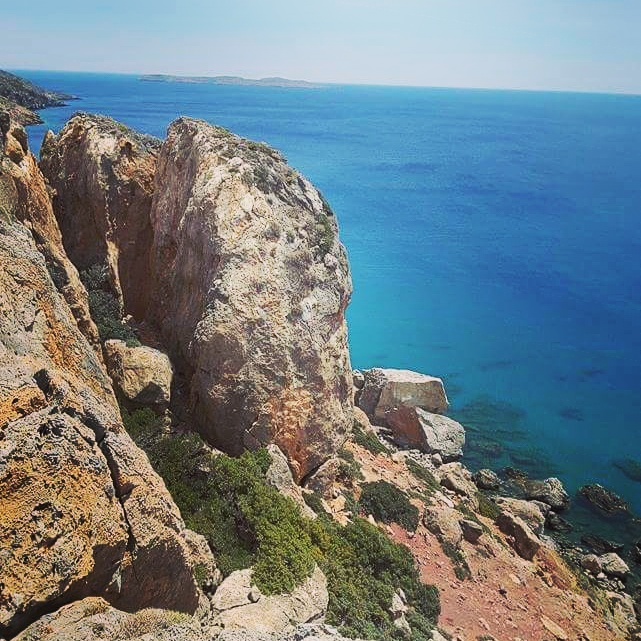 Ακρωτήρι κάβο Σίδερο This is a photography of Natura 2000 protected area with ID GR4320006